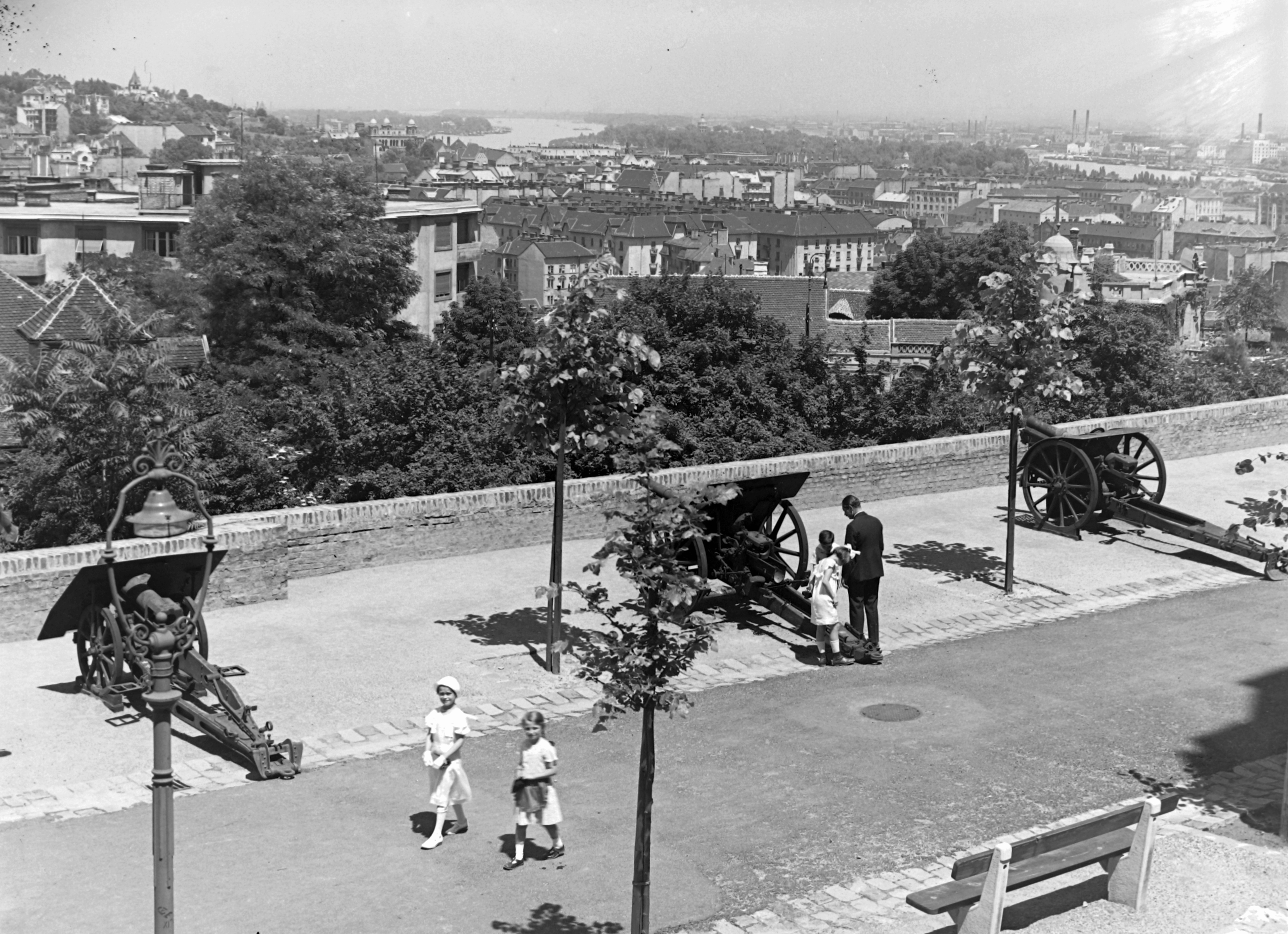 Anjou (Prímás) bástya. Location: Hungary, Budapest I. Tags: picture, cannon, genre painting, gas lamp, bench, Budapest Title: Anjou (Prímás) bástya.